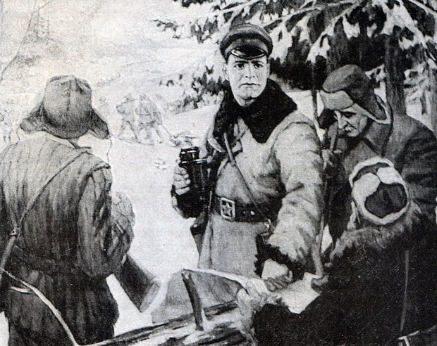 Канстанцін Заслонаў дае заданне